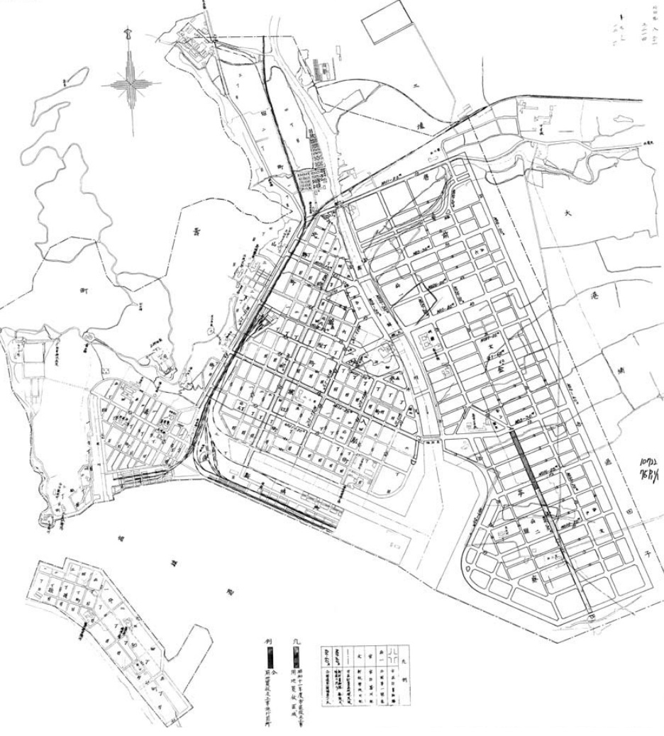 高雄市市區改正工事費（指令第六三二一號）高雄市區計畫圖